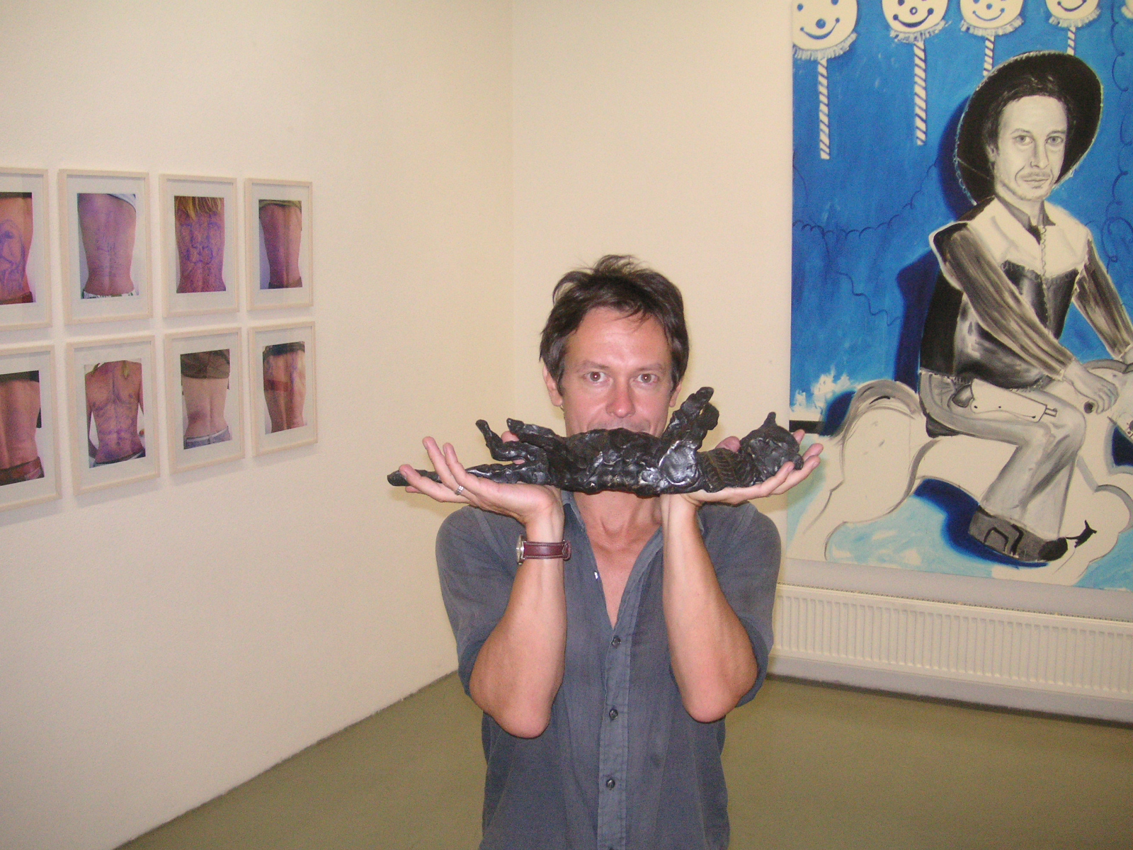 Ronald Kodritsch (2005)